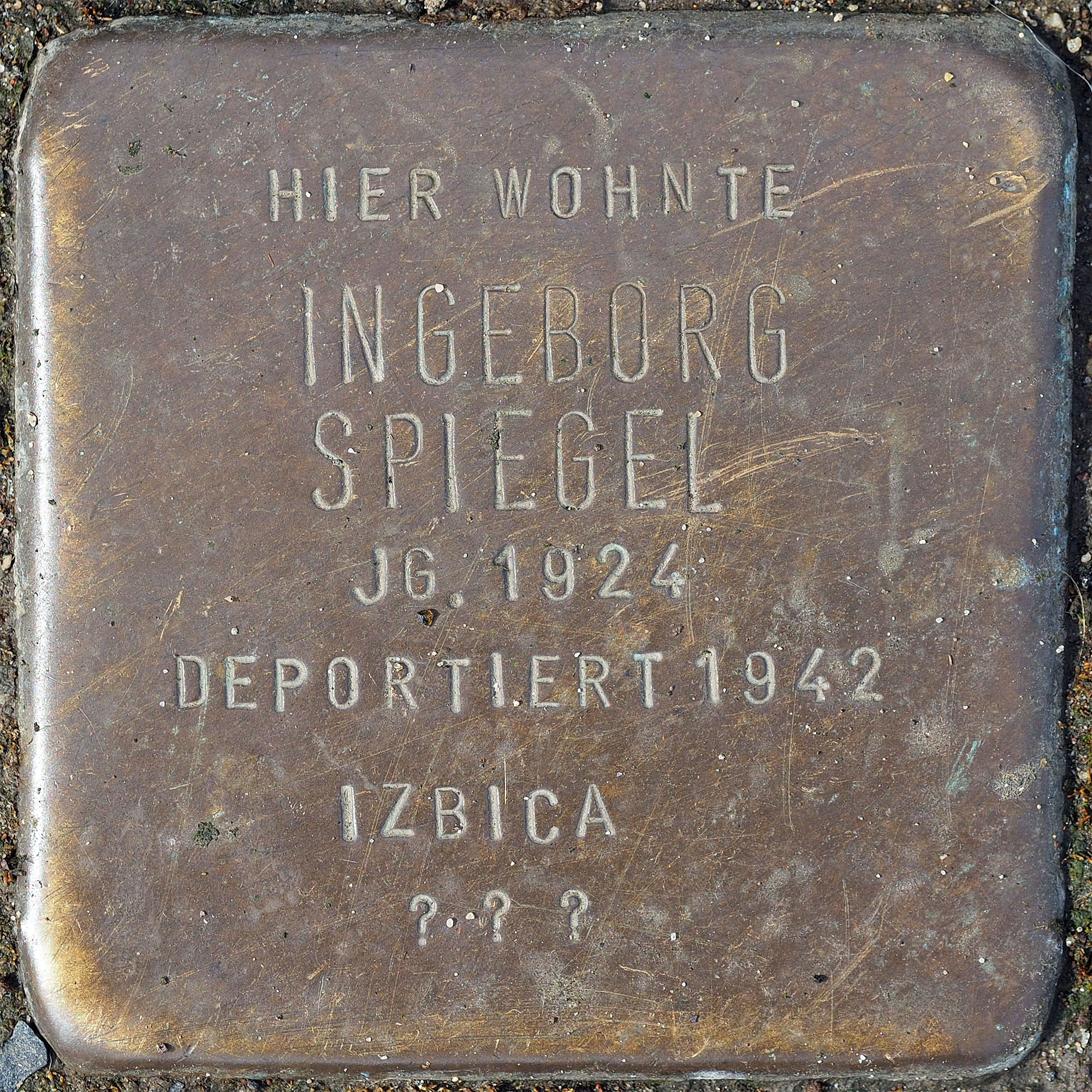 Stolpersteine MG: Spiegel, Ingeborg